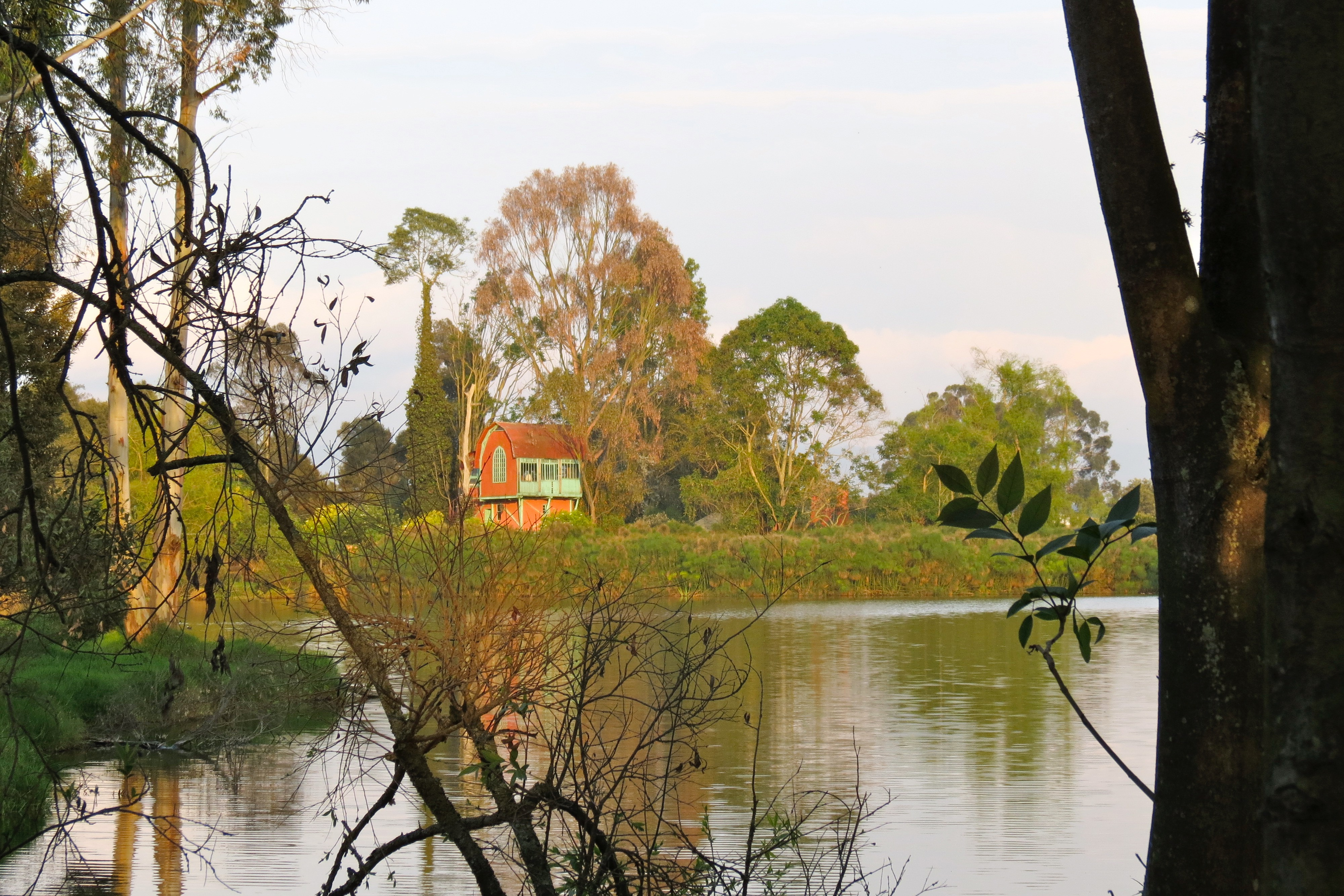 Esta fotografía fue tomada en el municipio colombiano con código 25286.